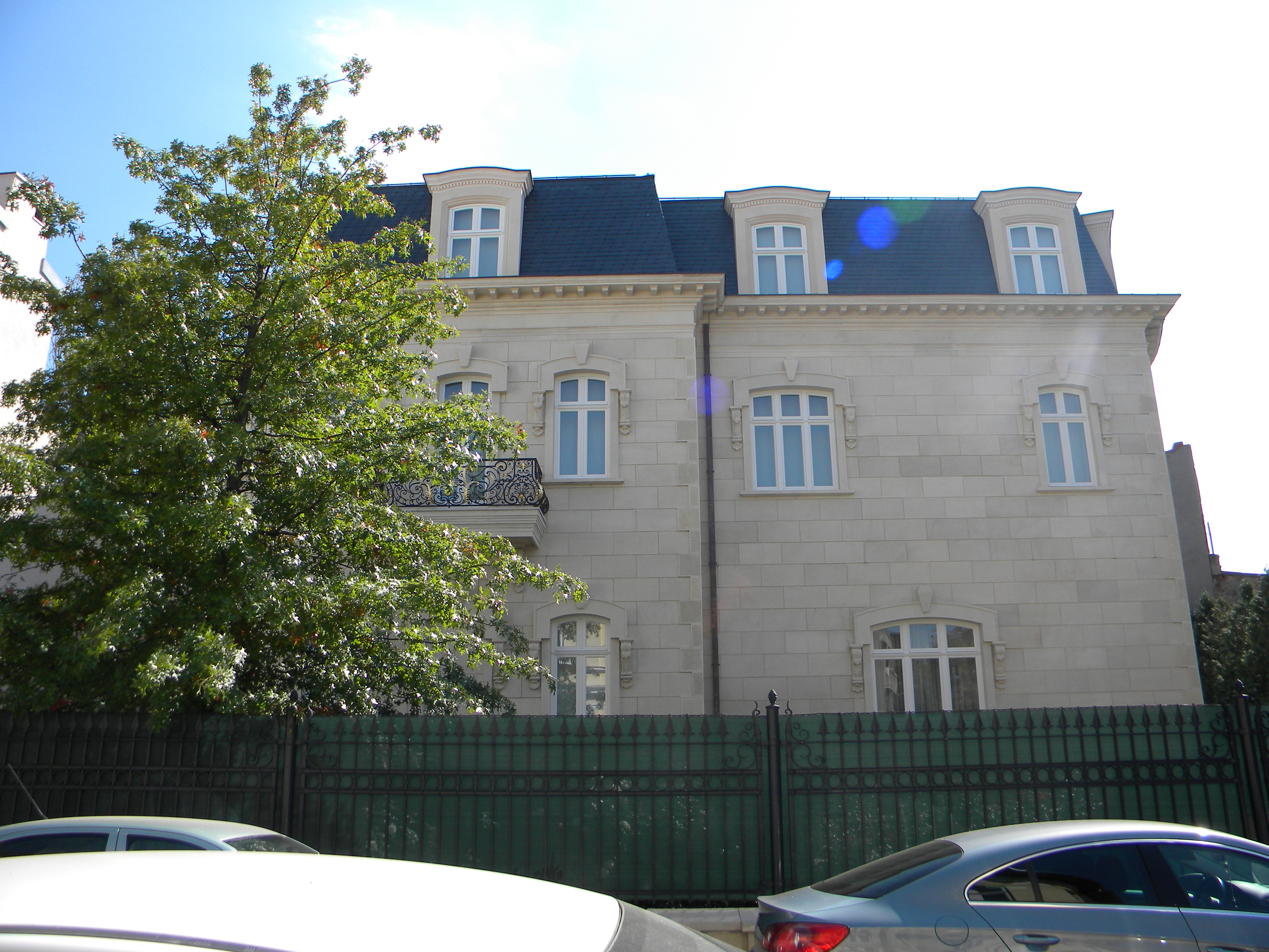 Bucuresti, Romania, Casa pe Str. Frumoasa nr. 24, sect. 1